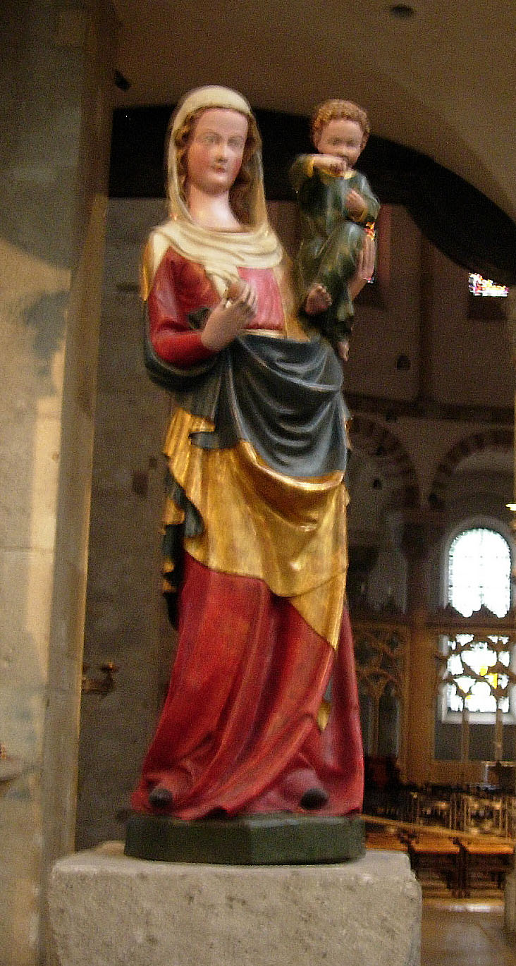 St. Maria im Kapitol, Köln